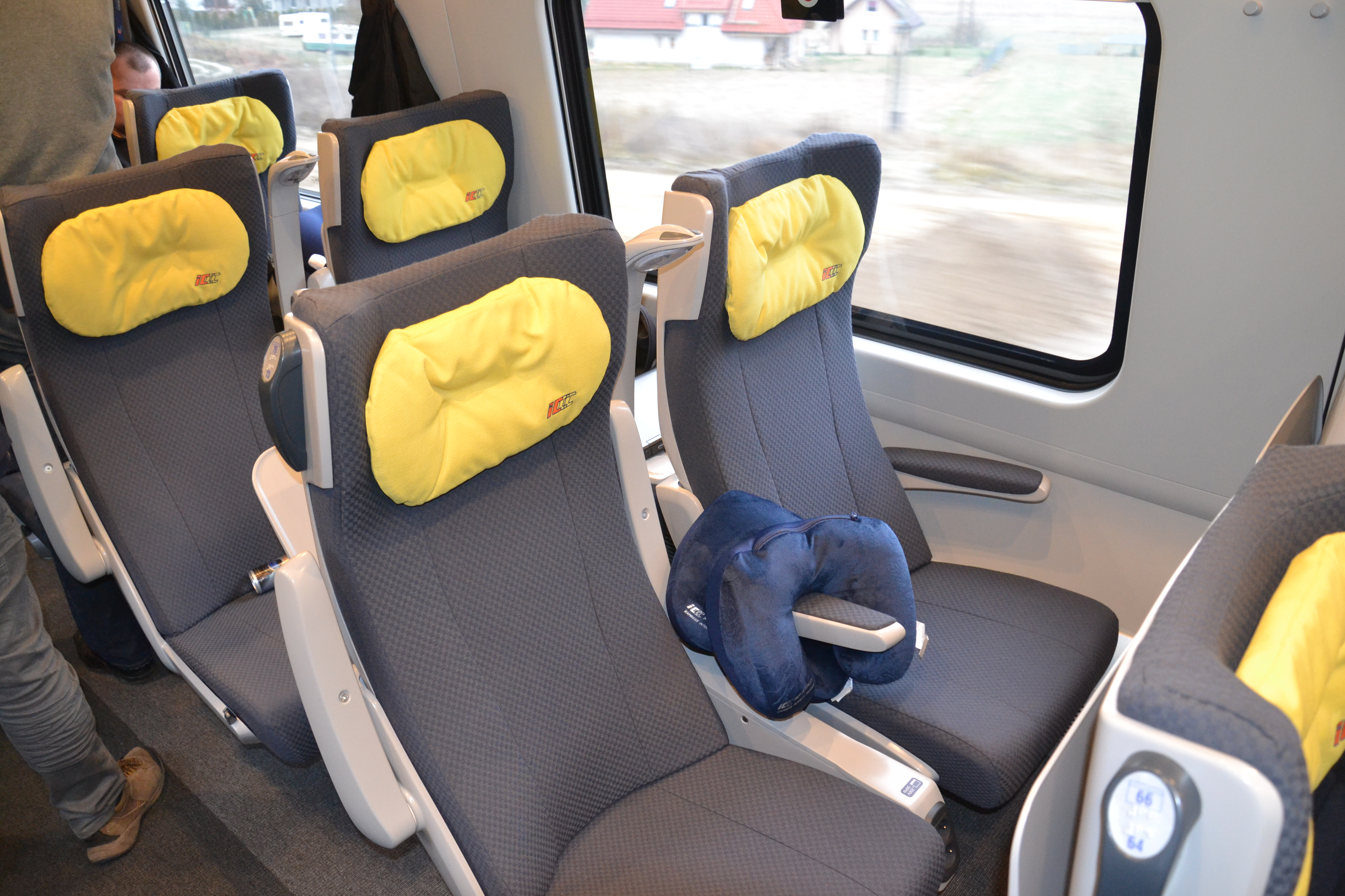 Przedział 1 klasy w ED250-007